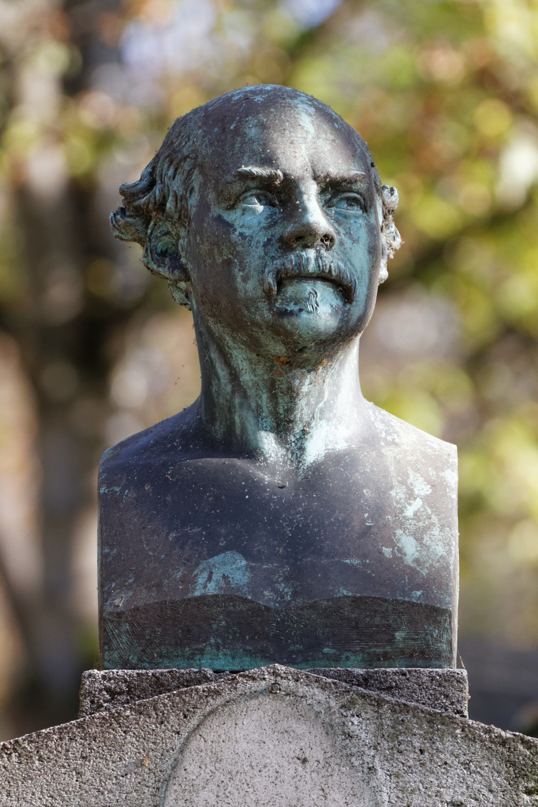 Stèle surmontée d'un buste en bronze signé Ele Truffot, 1864 et qui était ornée d'un médaillon en bronze signé Th. Gruyère, 1862.